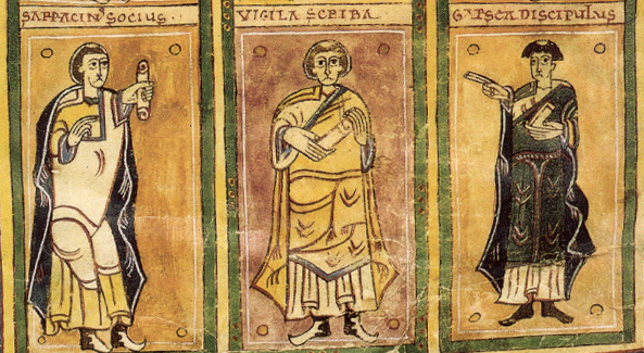 Escribas del Códice: Serracino, Vigila y García, según folio 428 del Códice Albeldense o Vigilano.